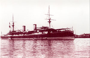 Crucero Esmeralda 1896